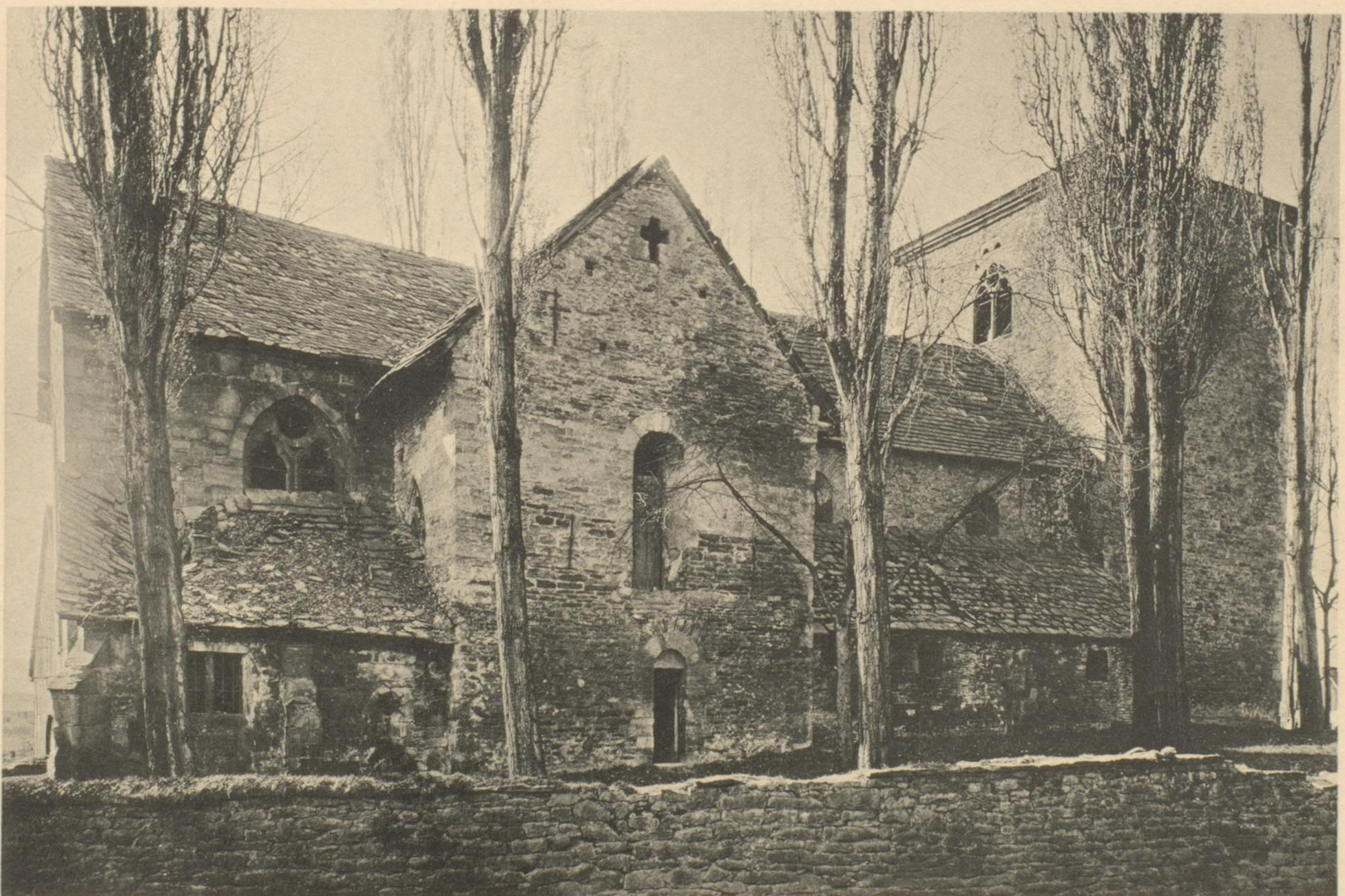 Die Georgskirche in Aplerbeck als verfallene Ruine von der Nord-Ostseite im Jahre 1893